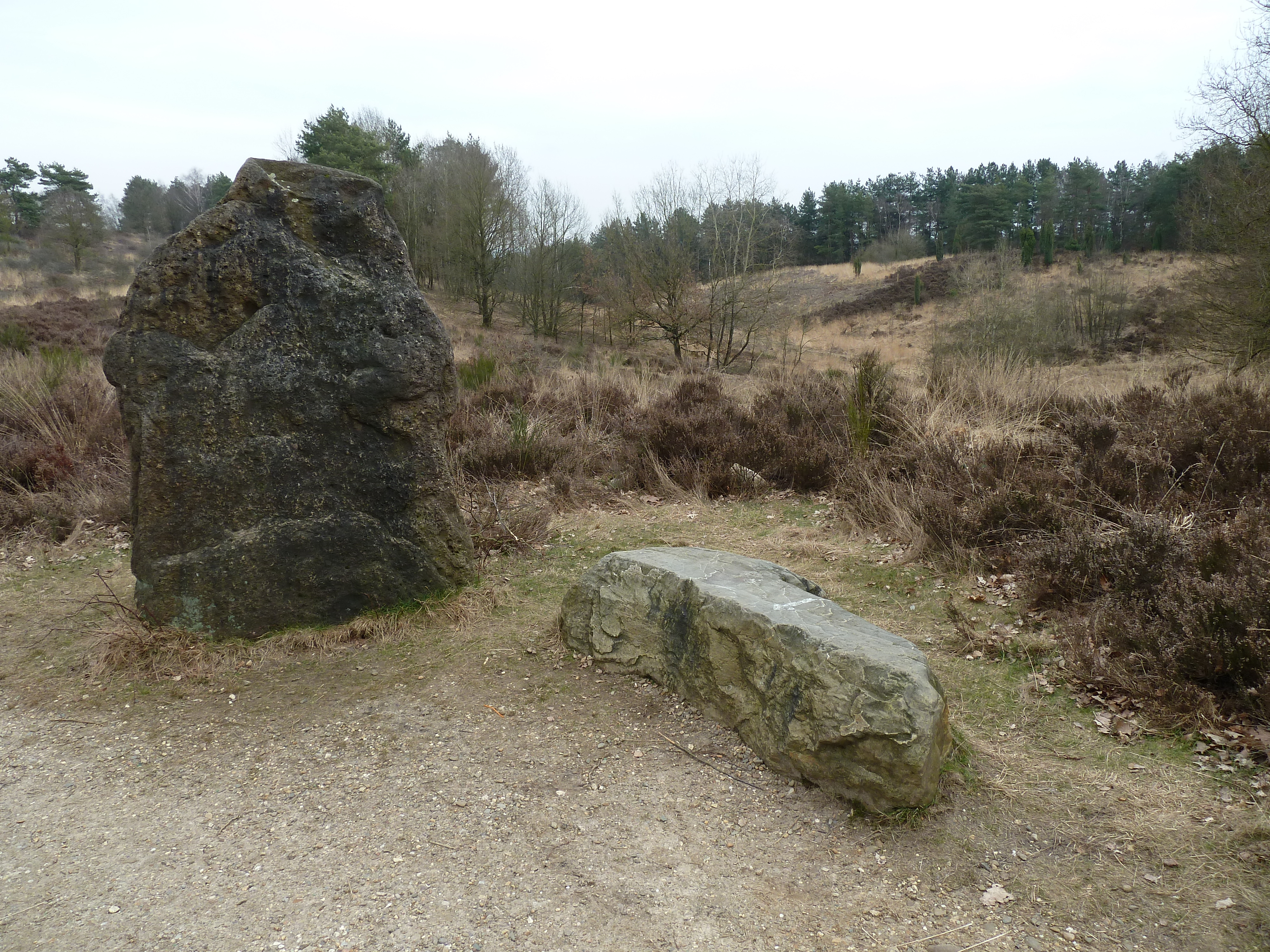 Stenen op de Mechelse Heide, Maasmechelen, Limburg, België